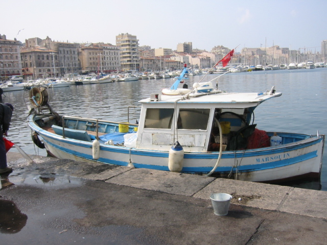 Vieux port de Marseille et bateau de pecheur